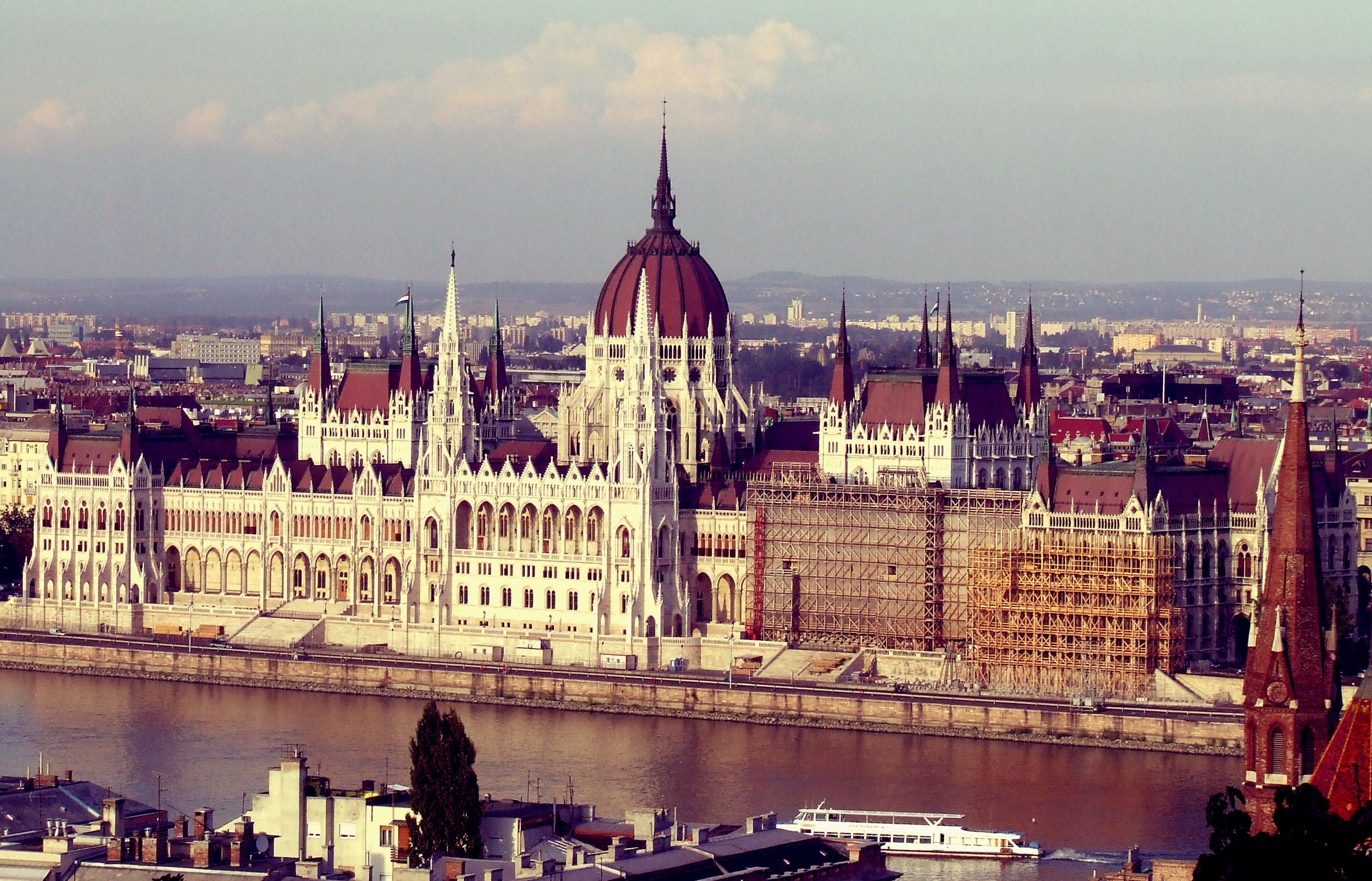 Parlament v Pešti, slikano z gradu (Budim)